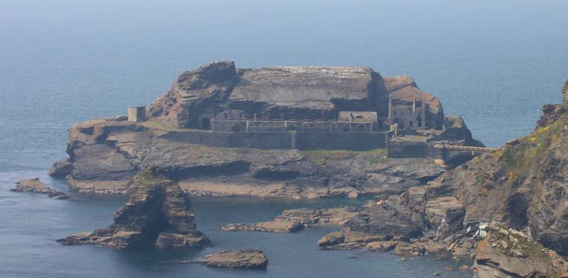 Fort des Capucins à Roscanvel